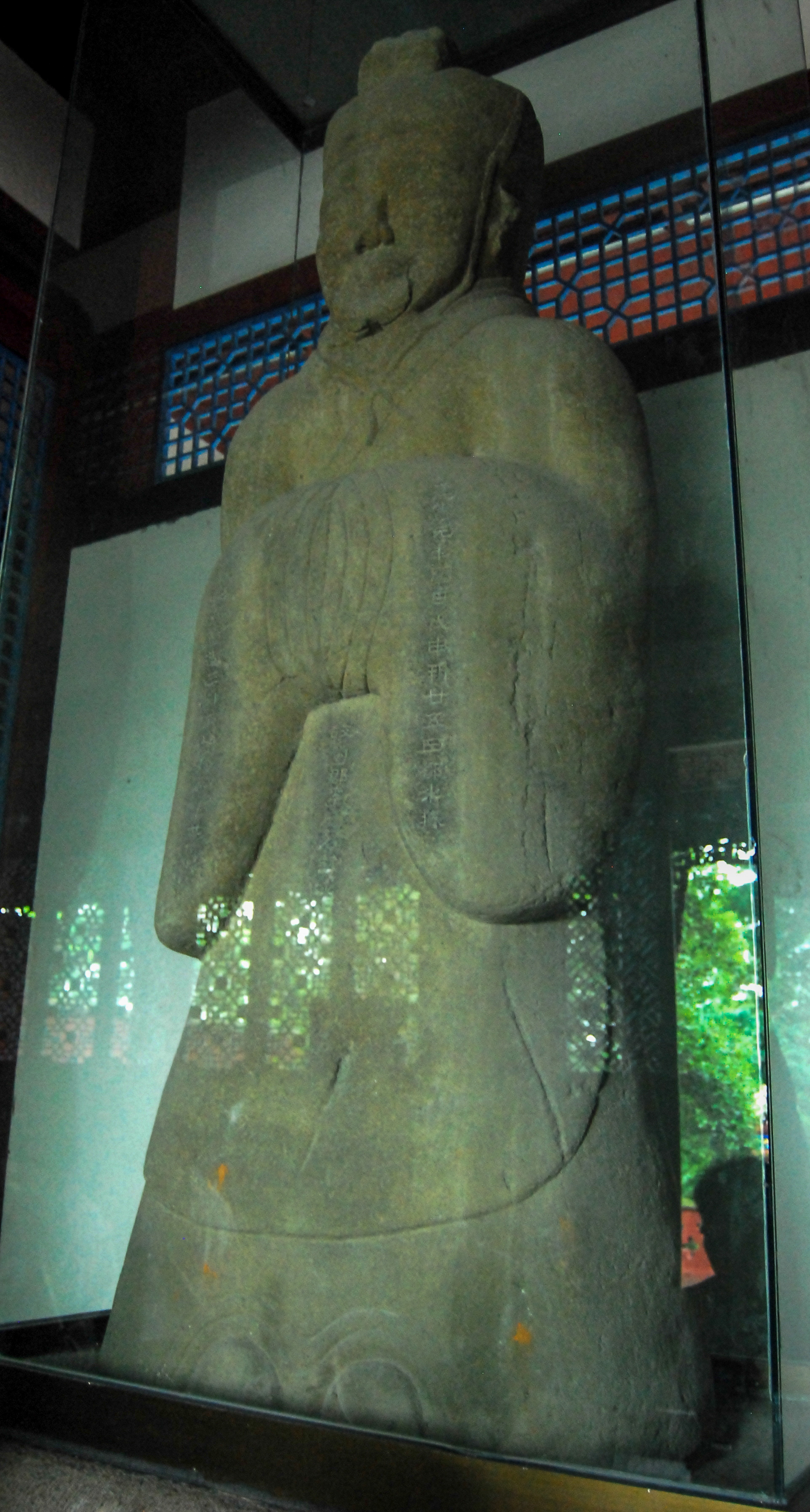 中文（中国大陆）: 都江堰伏龙观内李冰石像